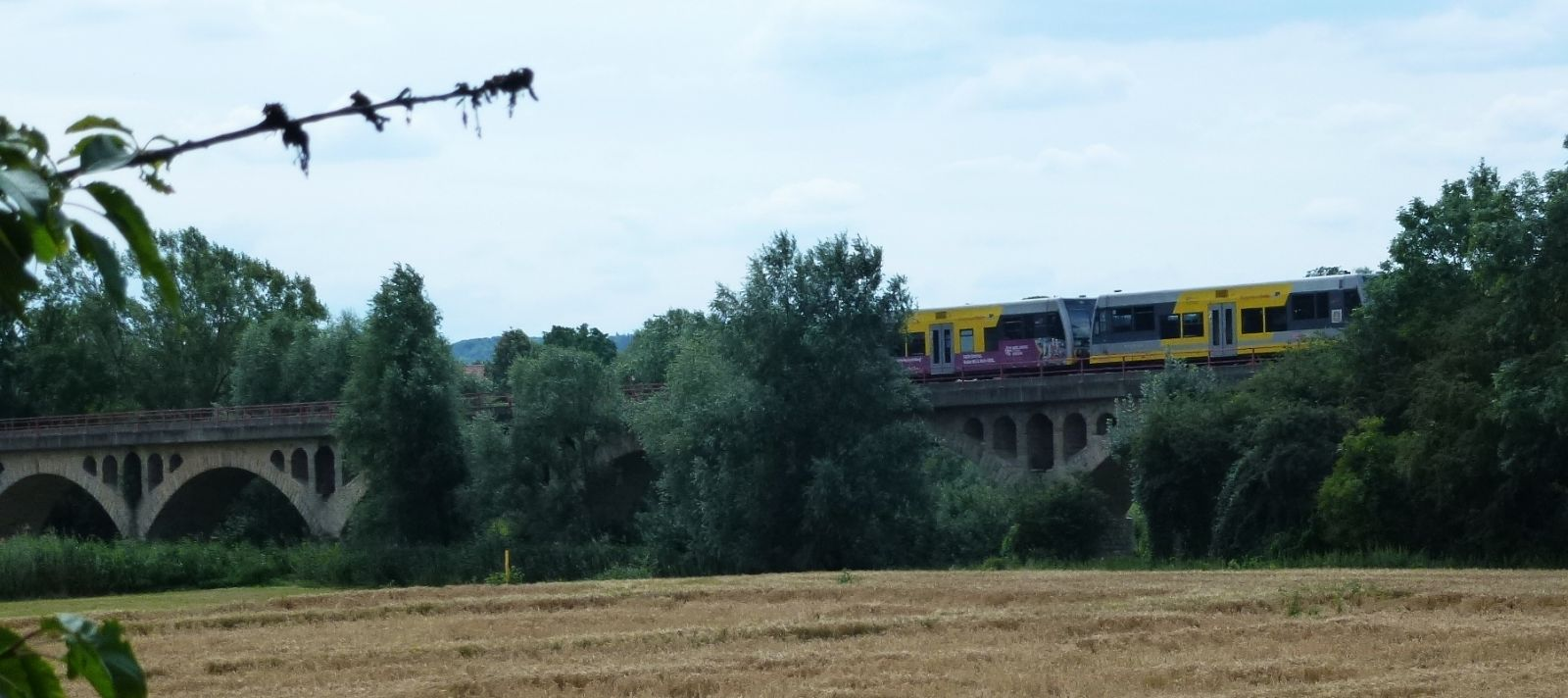 Eisenbahnbrücke über die Unstrut bei Kirchscheidungen